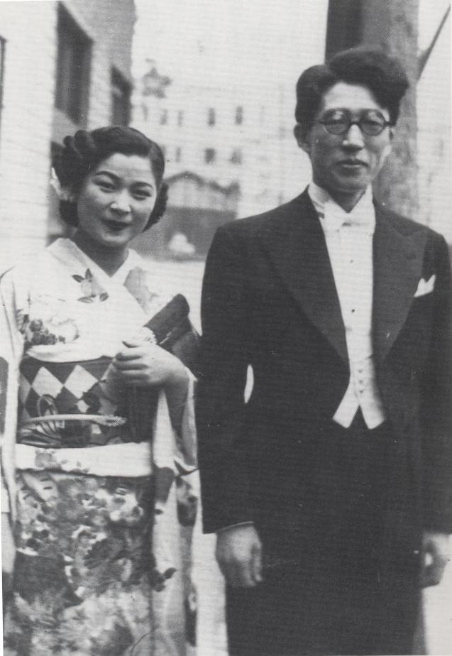 1949年、「どぶろくの辰」発表の際に撮影された写真